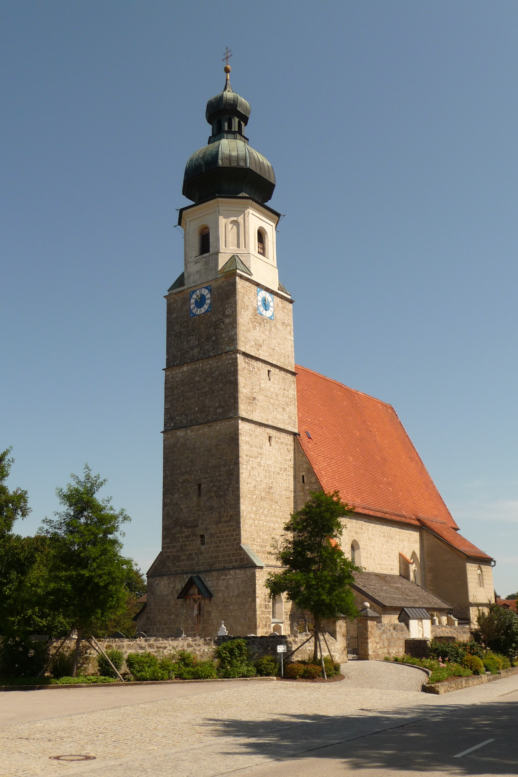 Die Pfarrkirche St. Stephan in Haiming